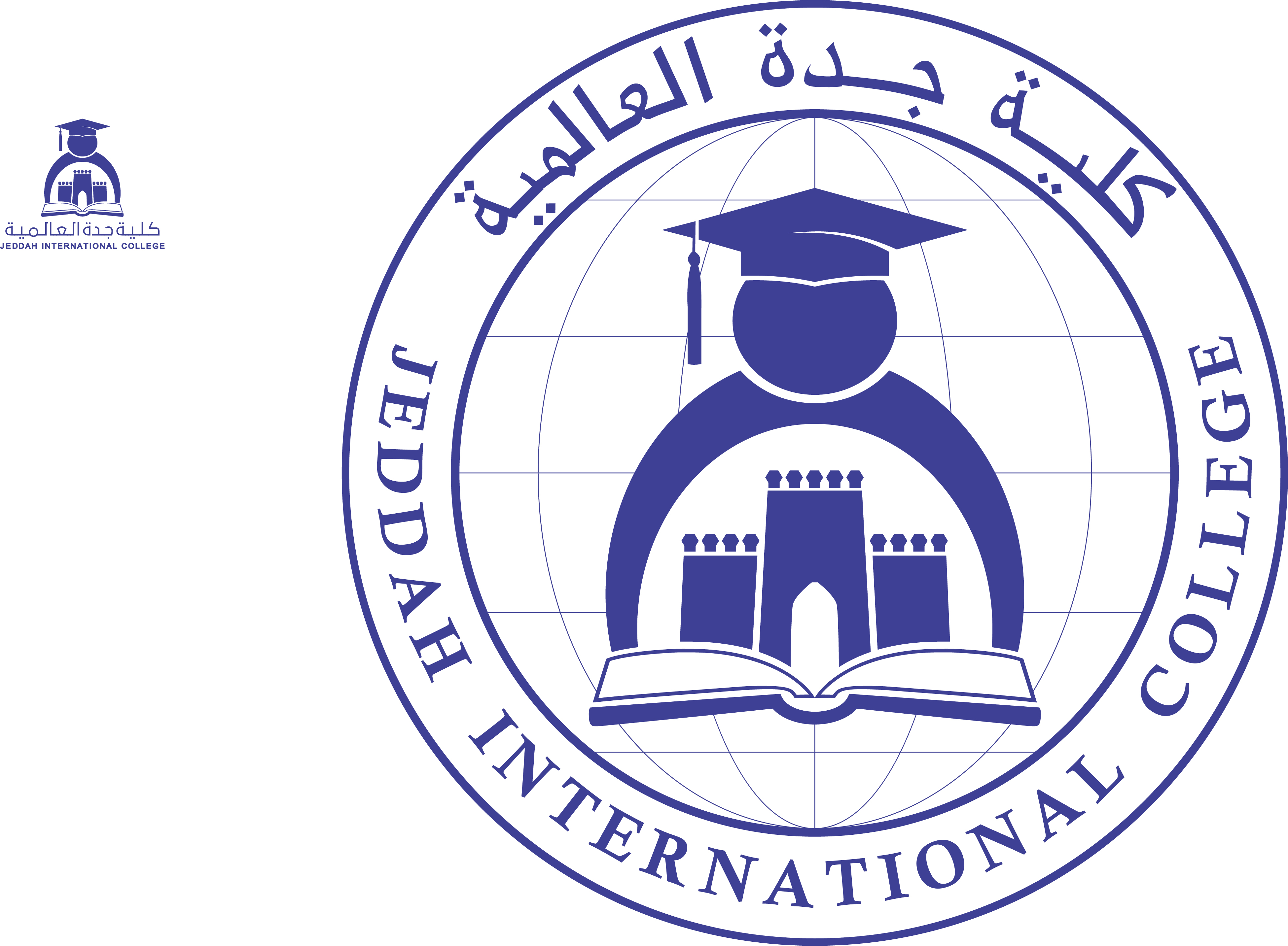 كلية خاصة بجدة